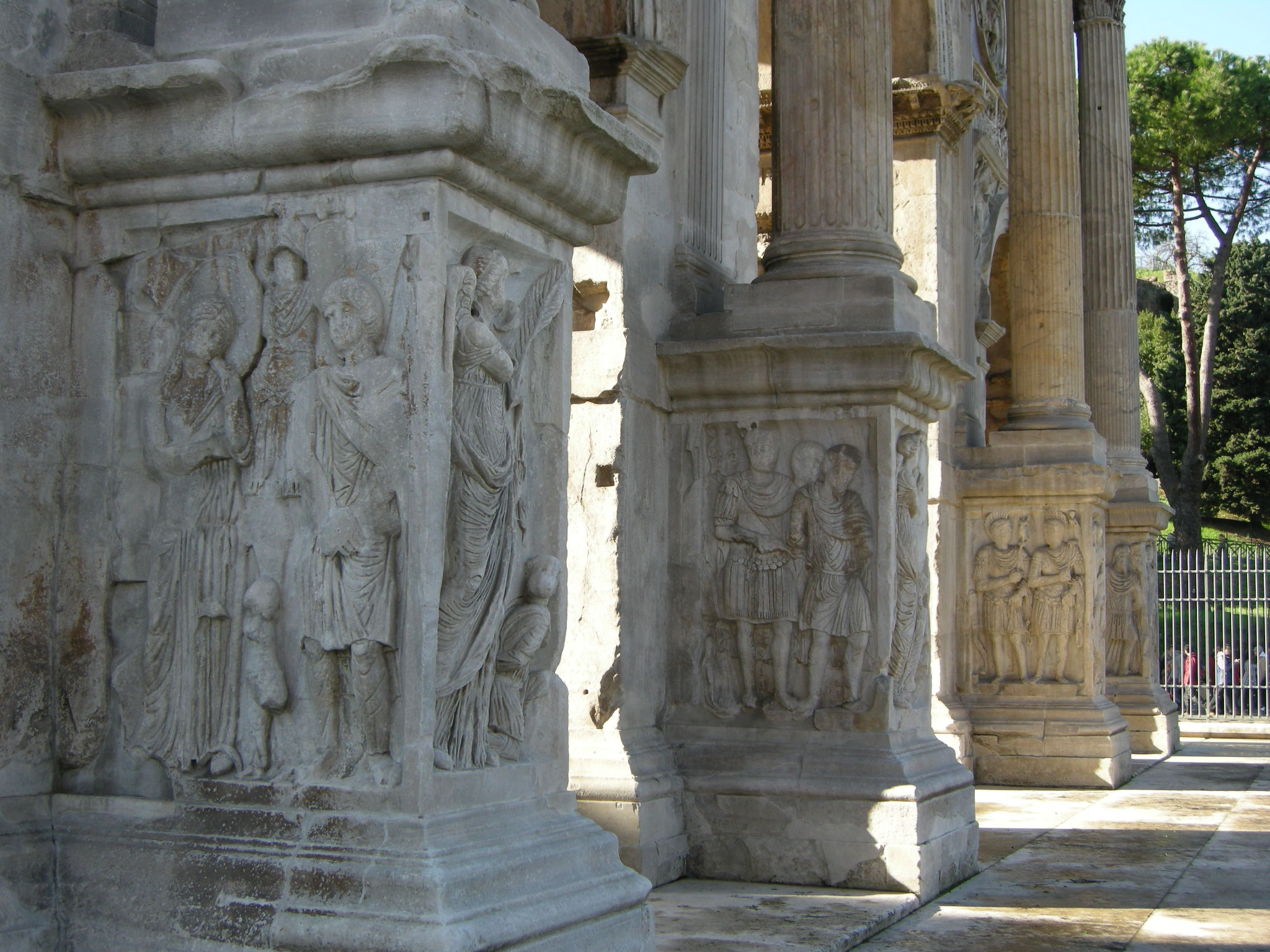 Arco di costantino, plinti